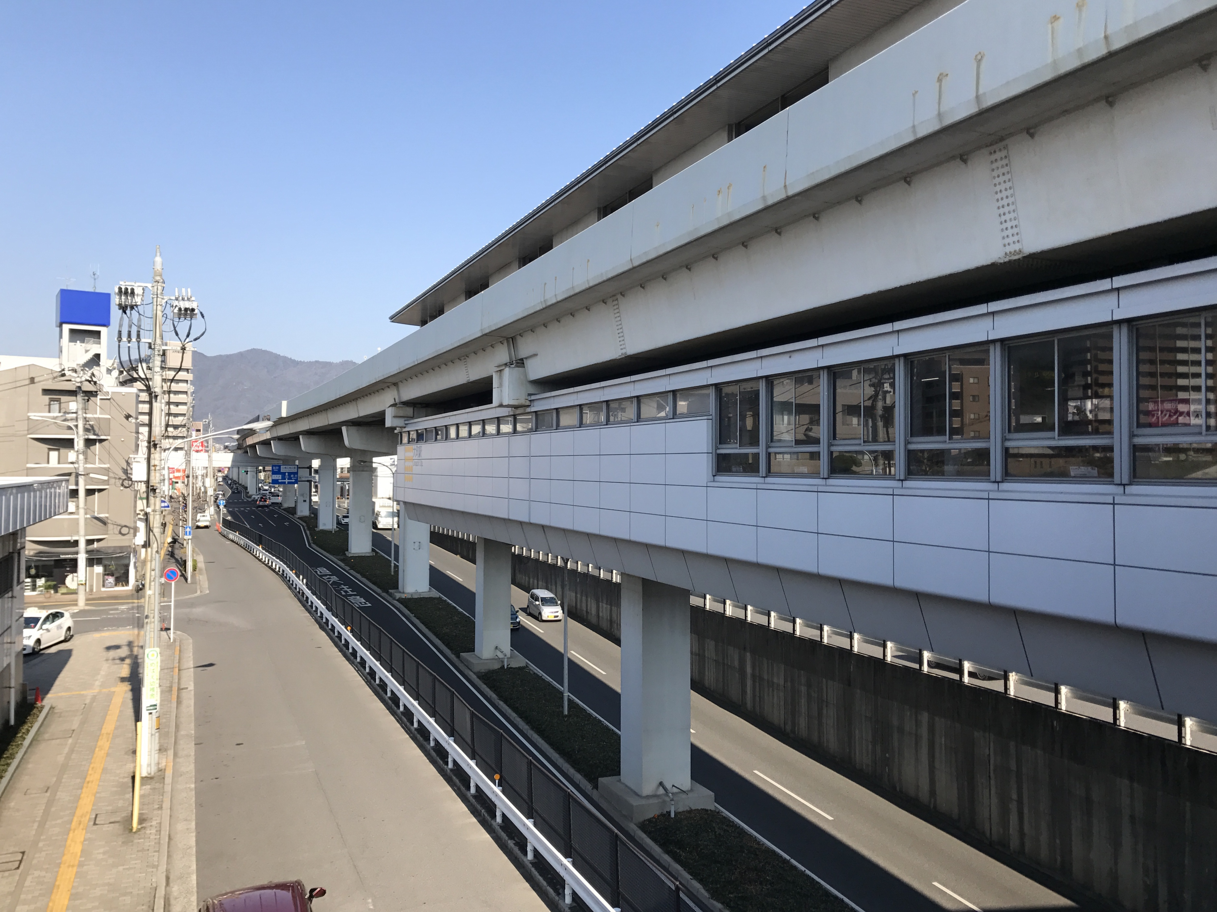 大町駅(アストラムライン)の2番入り口より望む駅舎。下の道路は広島県道38号